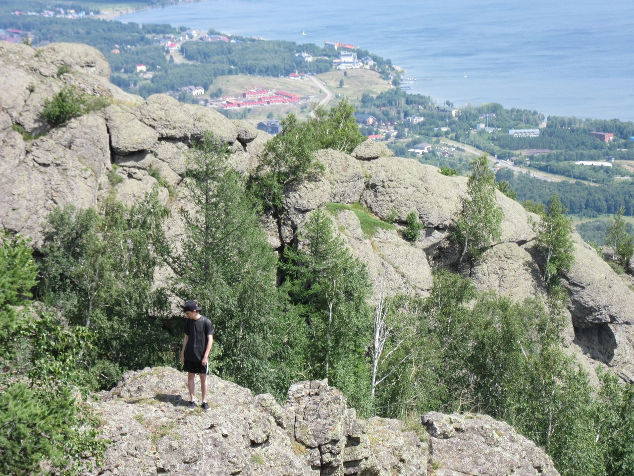 Якты-Куль (Банное озеро), Абзелиловский район, Башкортостан. This image is related to the protected area of Russia number 0200017